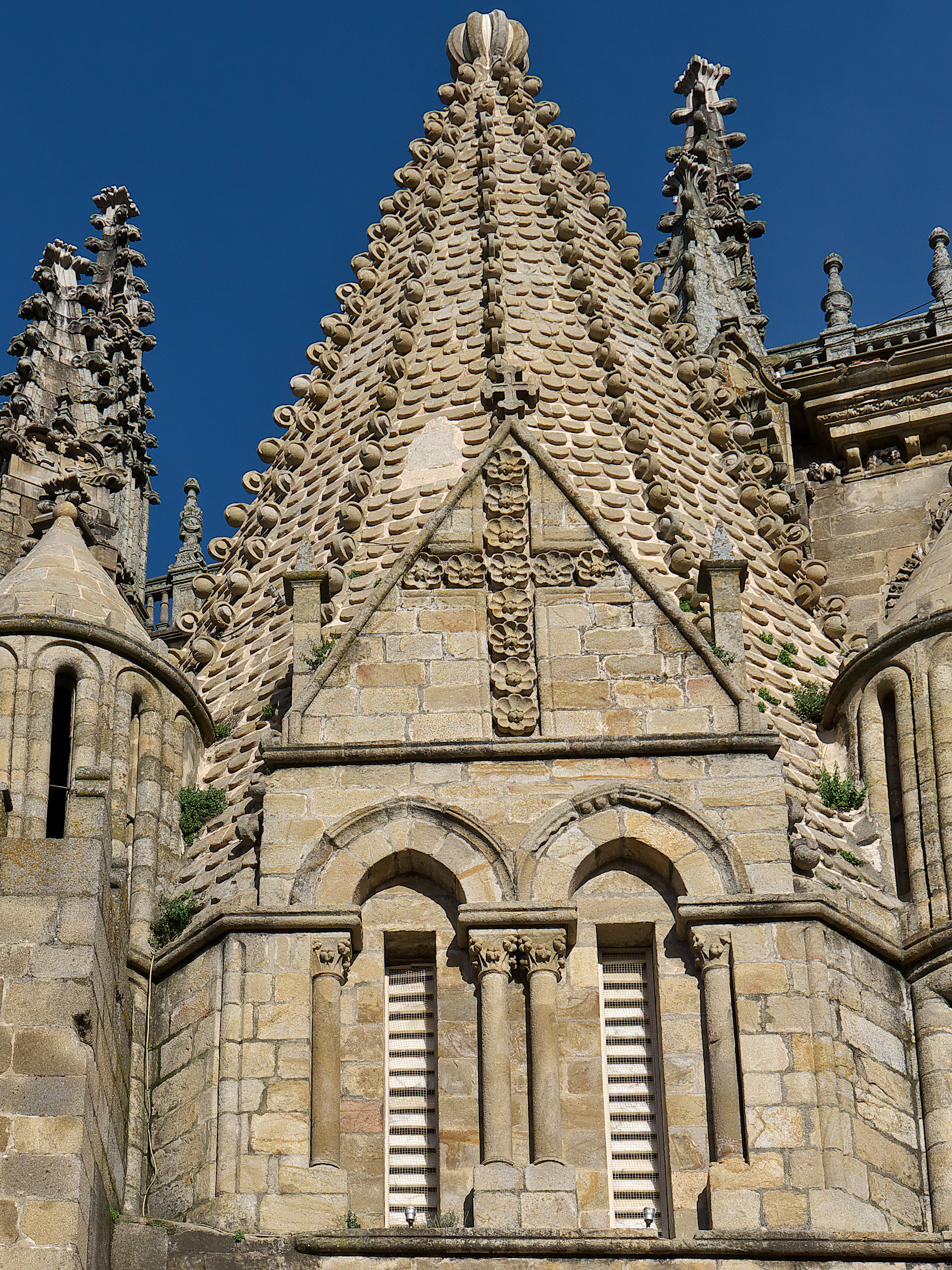 Cimborrio de la Capilla de San Pablo, antigua sala capitular de la Catedral Vieja de Plasencia, fechado a finales del s. XIII o principios del XIV. Atribuido al maestro Gil de Císlar, posiblemente, representante de la Escuela románica de Poitou. Campanario de la Abadía de las Damas (Saintes)